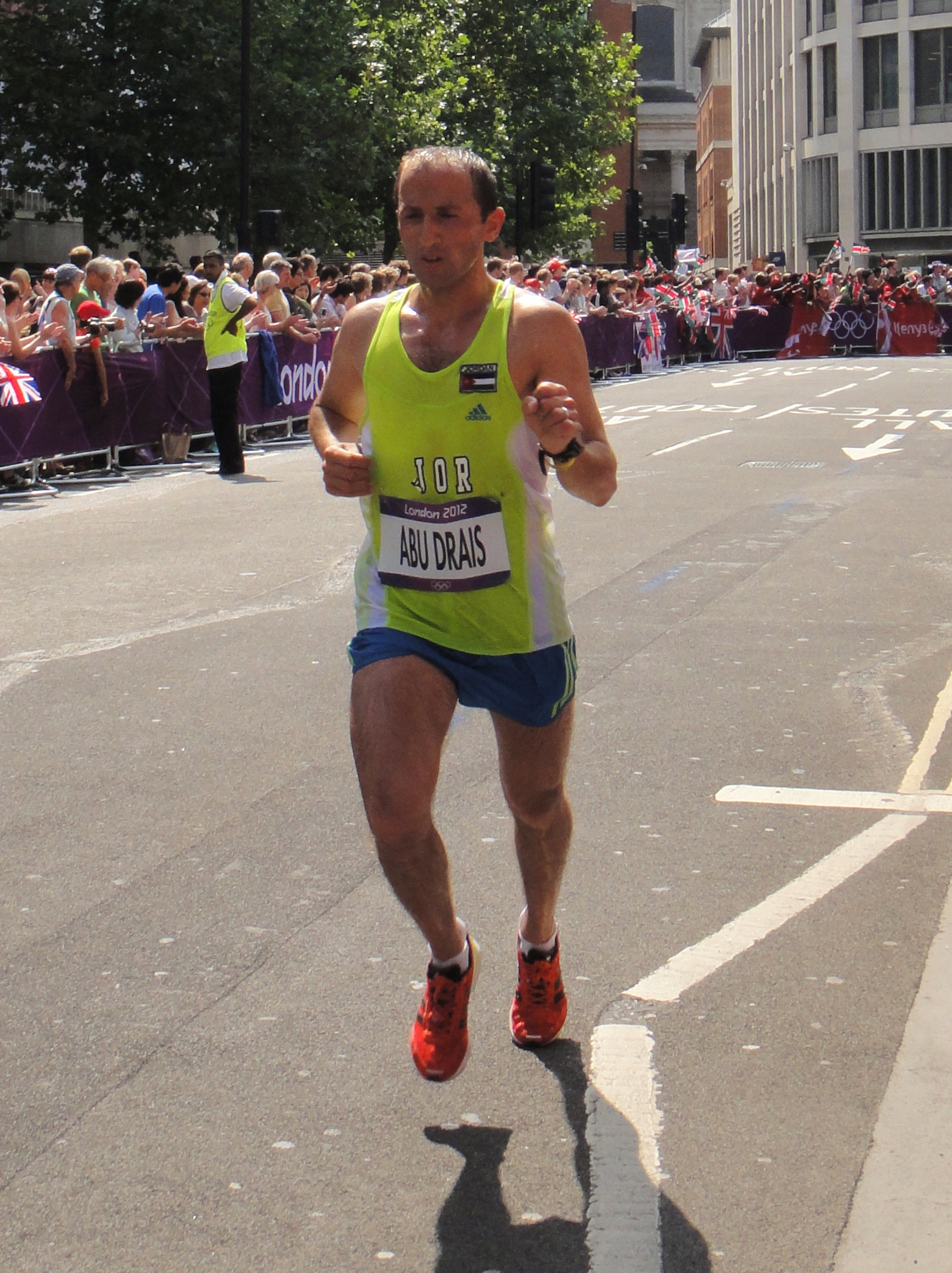 Methkal Abu Drais (Jordan) - London 2012 Men's Marathon